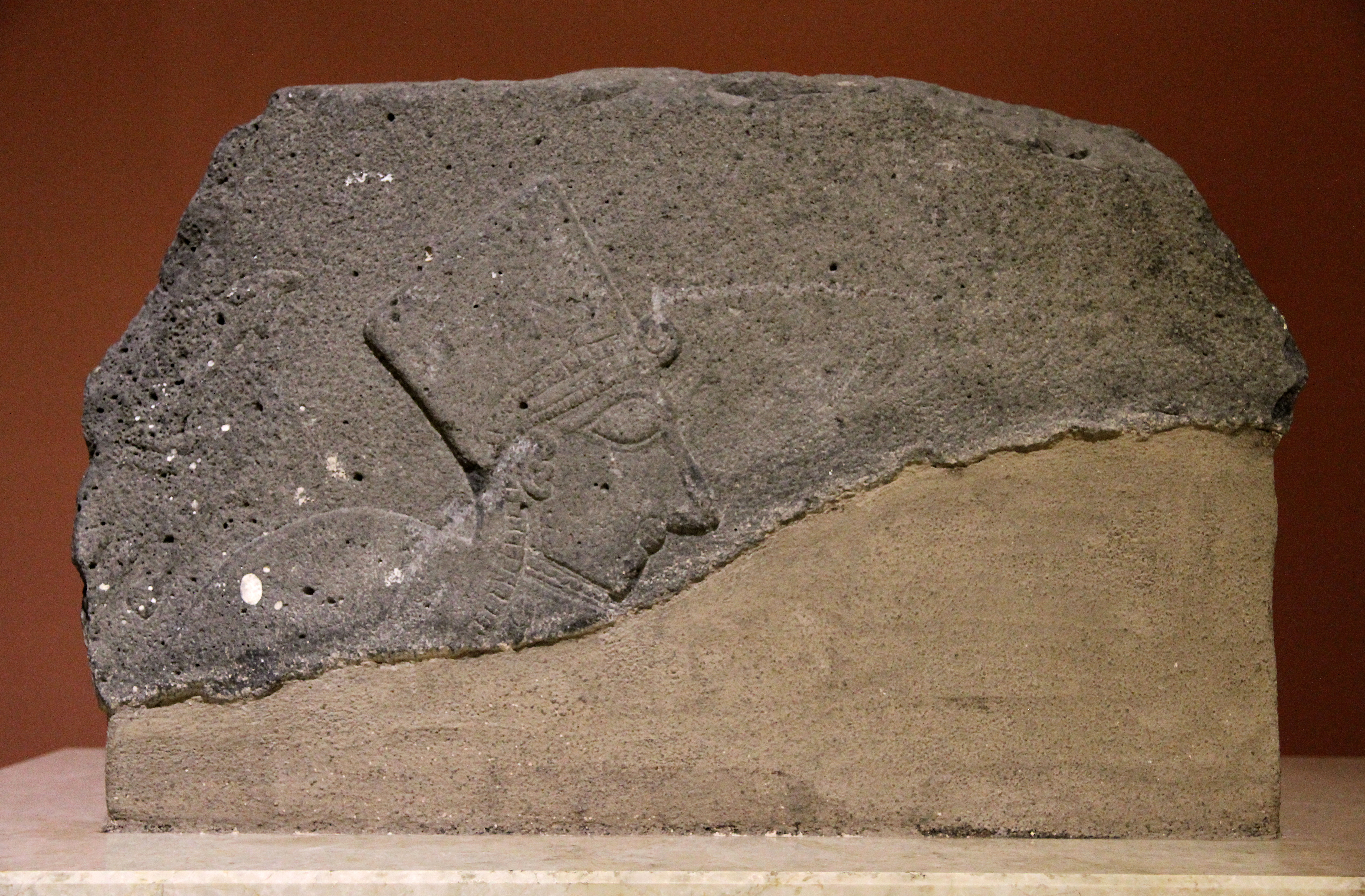 Archäologisches Museum Kahramanmaraş, Türkei, späthethitische Stele Maraş 15